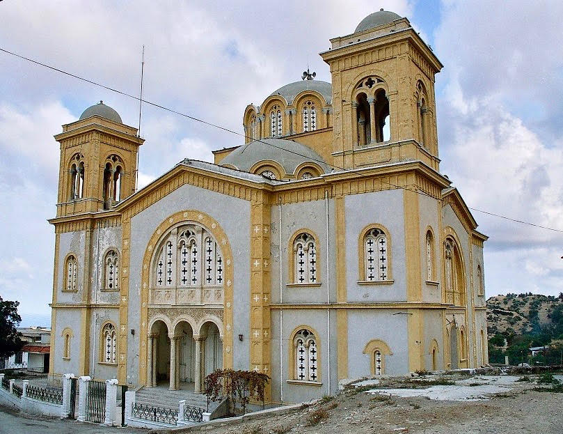 Ekklisia leukara